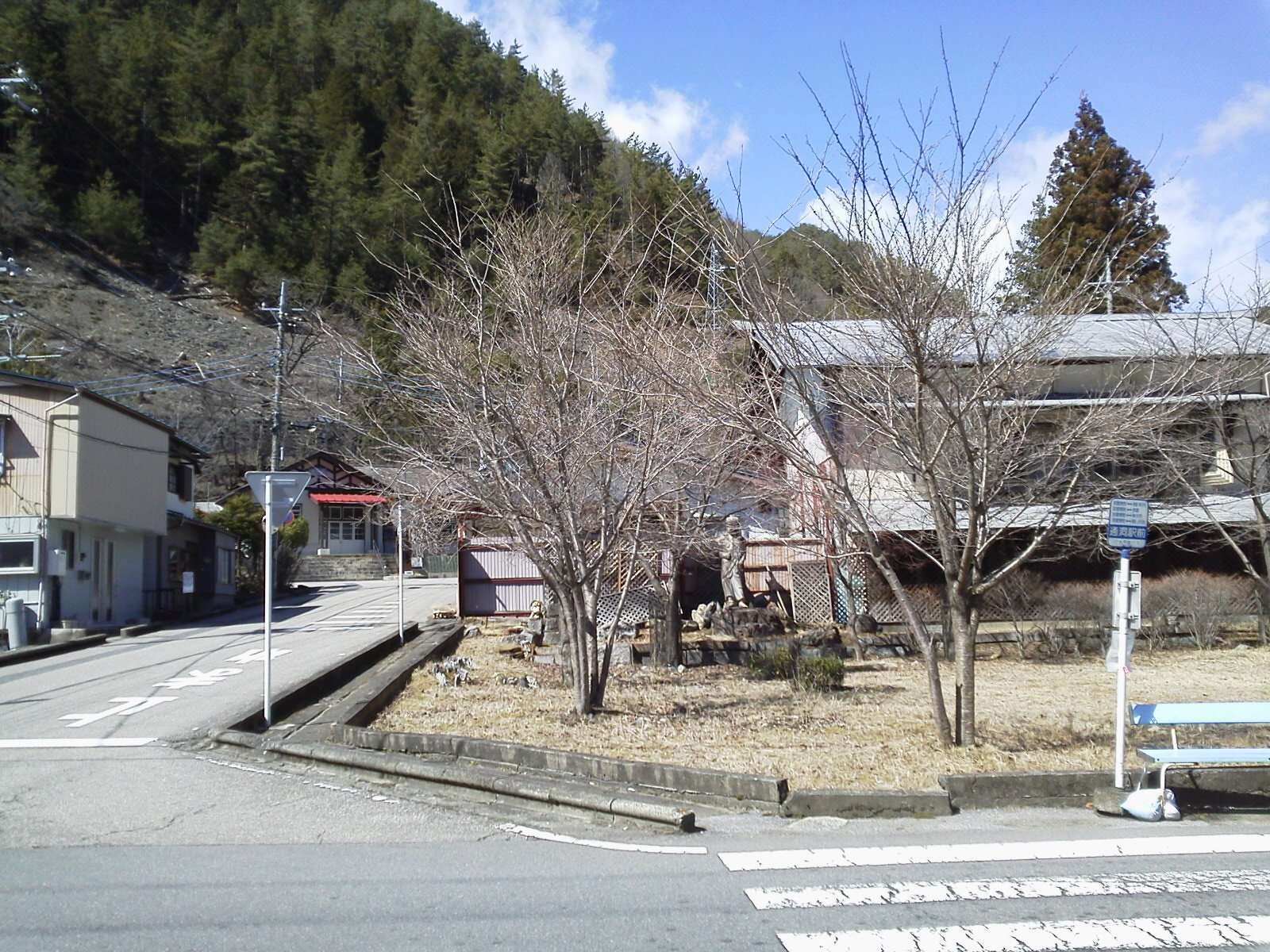 Tsudo bus